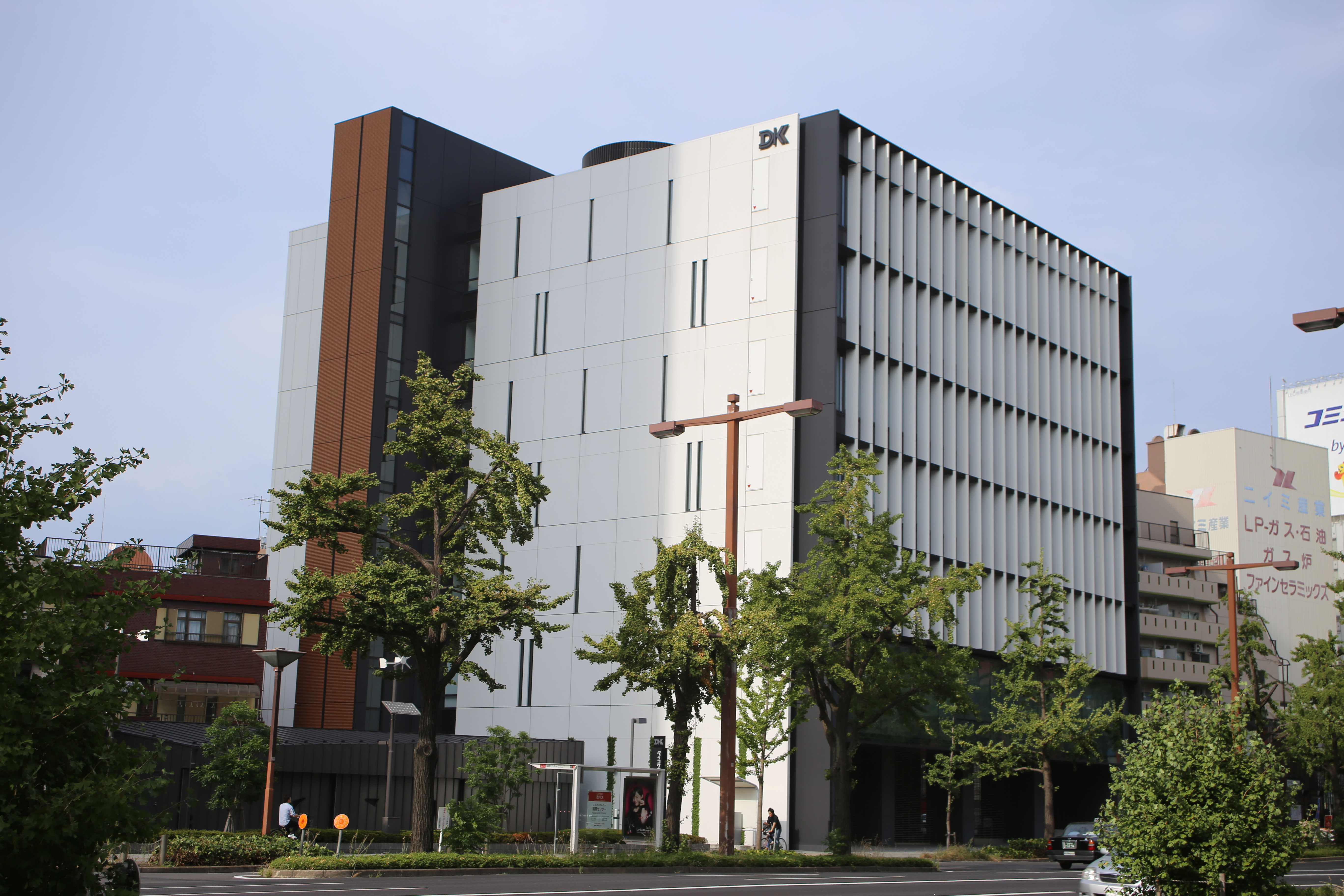 名古屋市中村区那古野一丁目のダイコク電機本社を南側公道西側より撮影